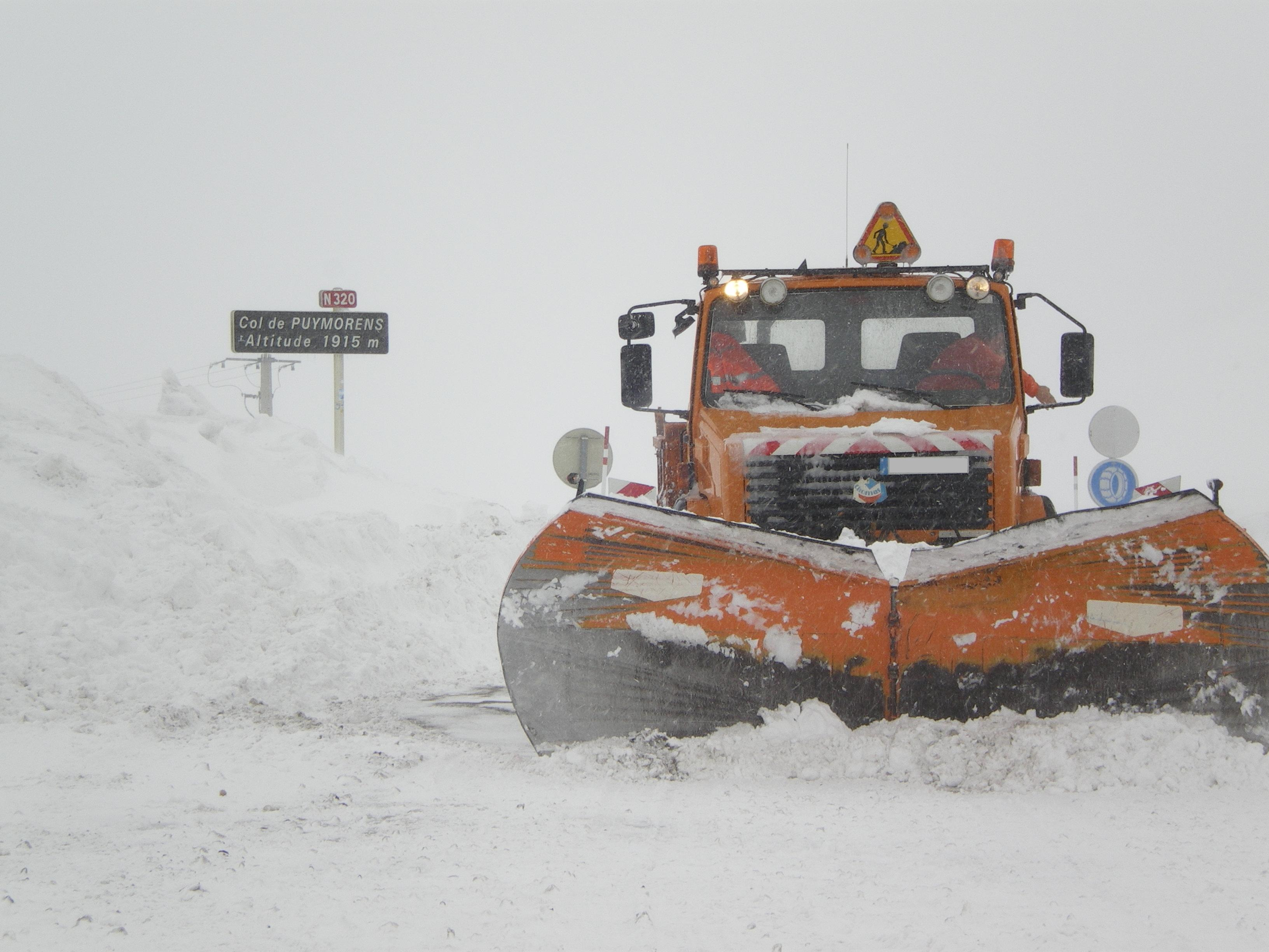 Déneigement de la route du col par un chasse neige.